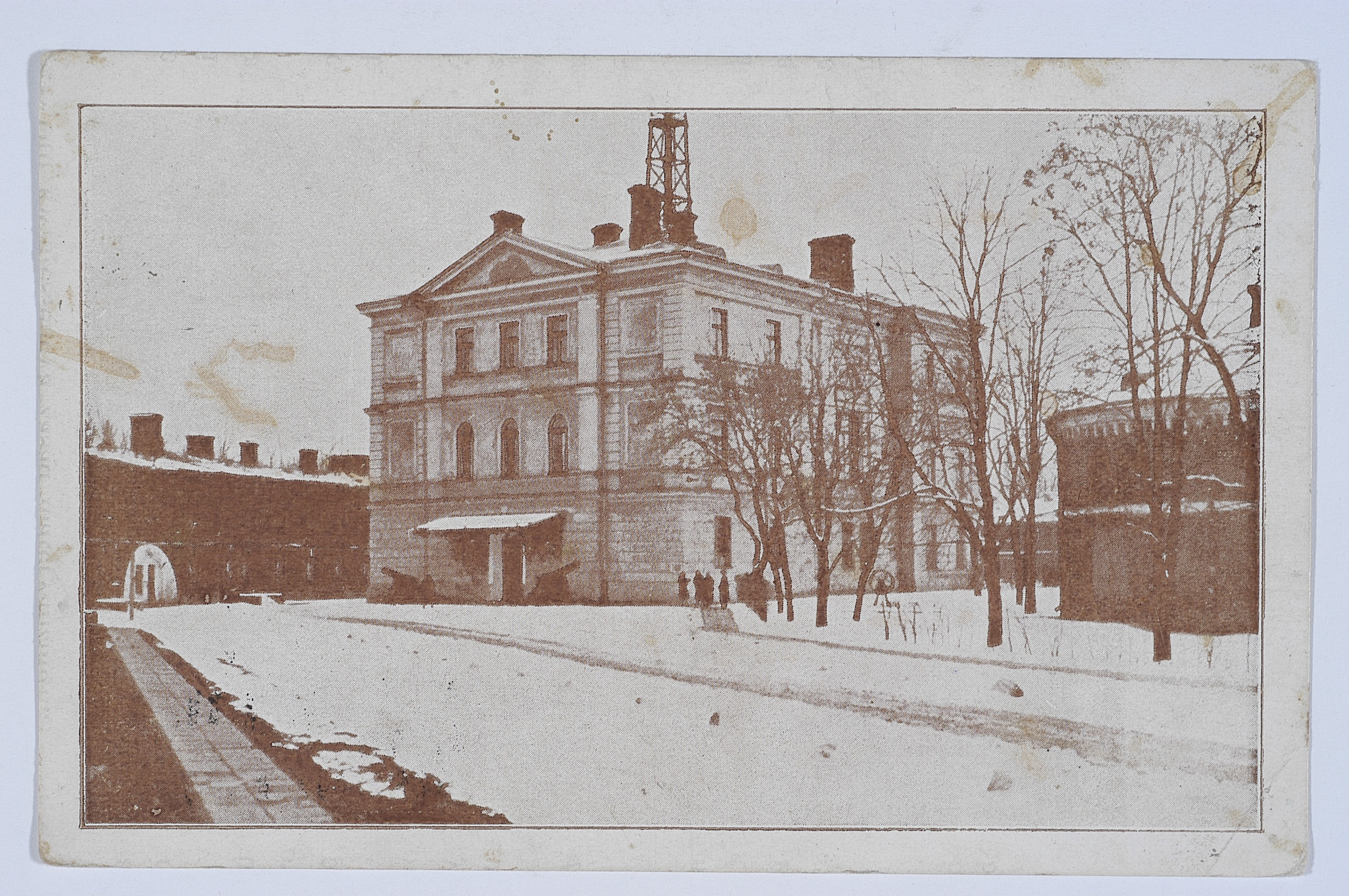 Беларуская (тарашкевіца): Берасьце (Bieraście), вуліца Базылянская (vulica Bazylanskaja). Царква Сьвятых Апосталаў Пятра і Паўла па руйнаваньні расейскімі ўладамі